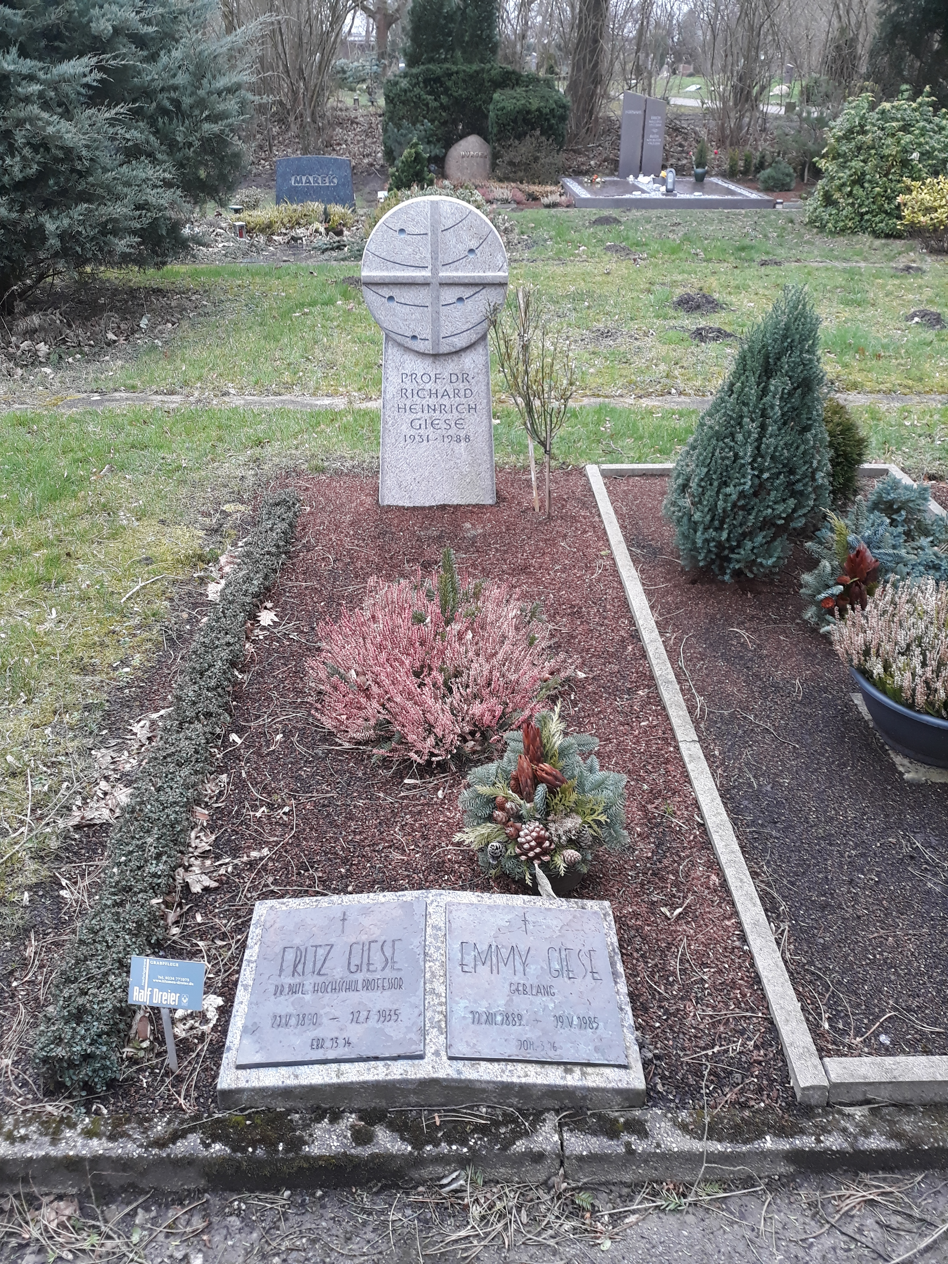 Das Grab des deutschen Astrohysikers Richard Heinrich Giese sowie seiner Eltern, der Psychologe Fritz Giese mit Ehefrau Emmy, auf dem Friedhof Querenburg in Bochum.